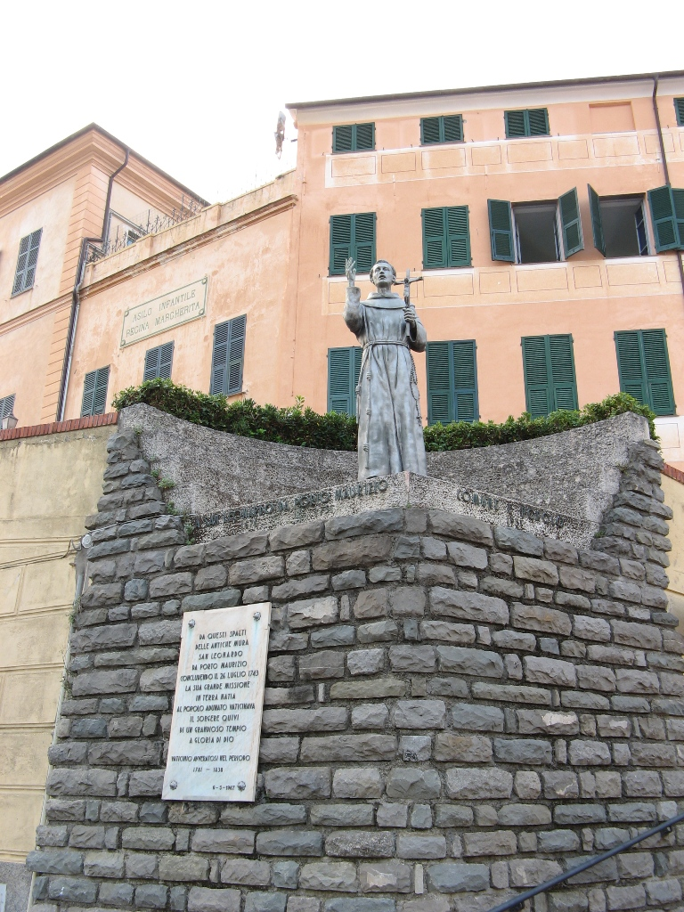 Statua di S.Leonardo da Porto Maurizio, Imperia (Italy)